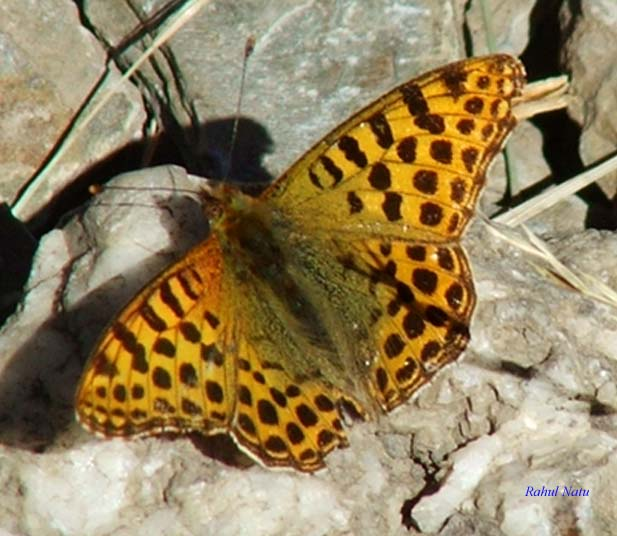 Rahul Natu